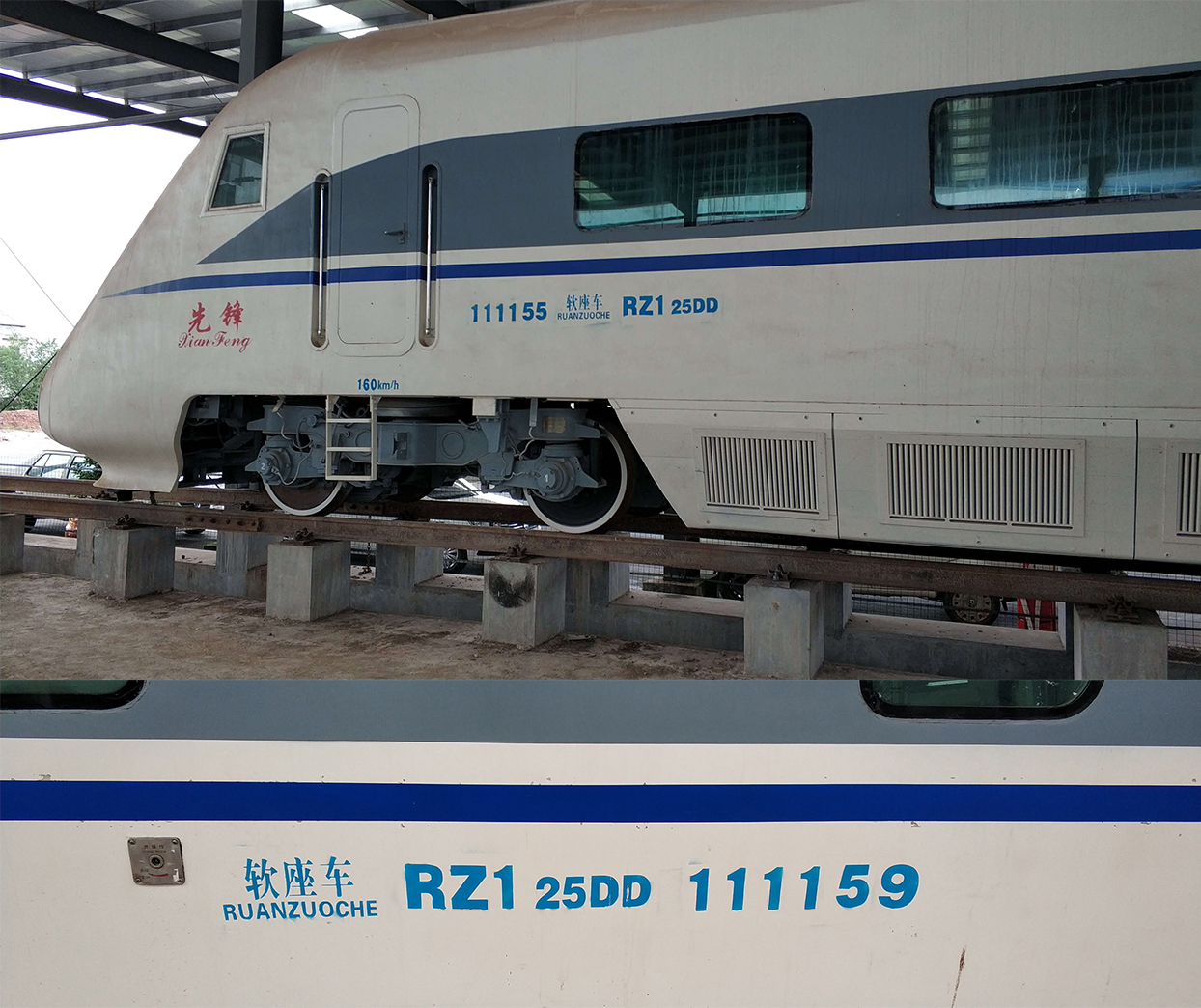 中文（中国大陆）: 车号刷错的经典例子